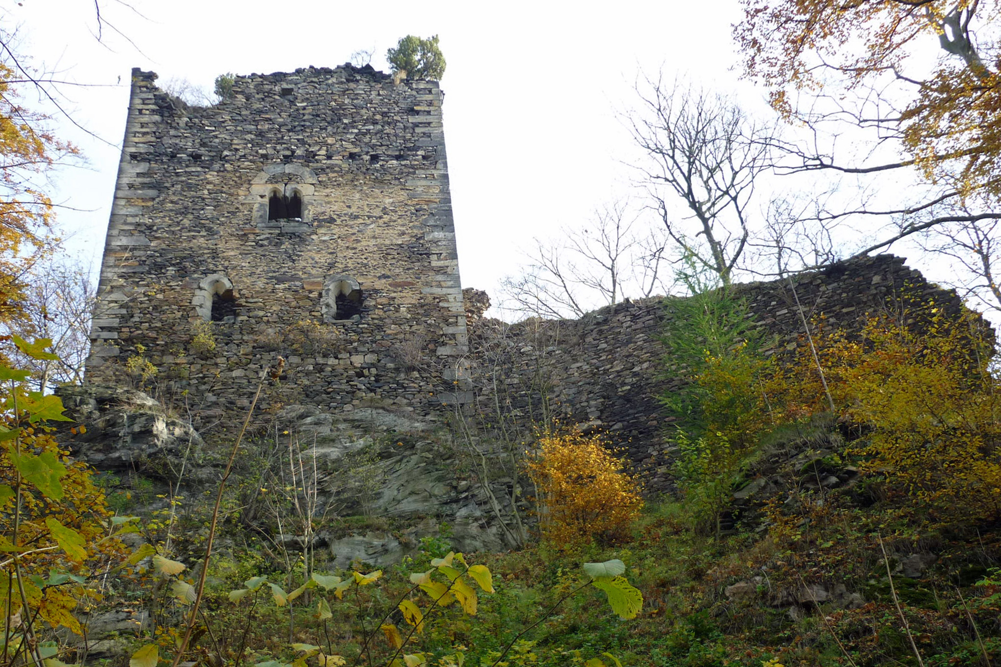 Burgruine Riesenburg bei Ossegg in Nordböhmen